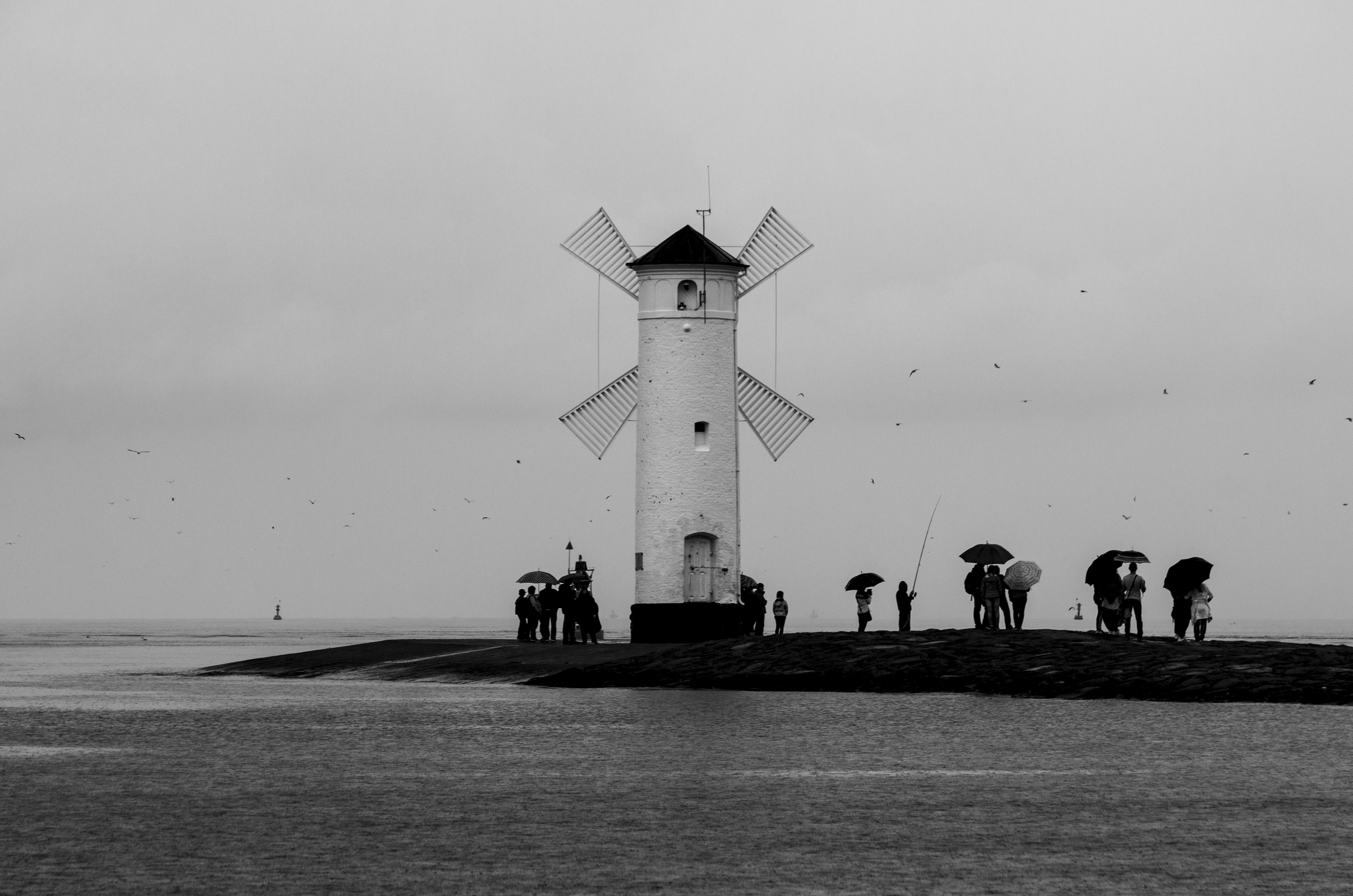 Stawa Młyny od strony świnoujskiej plaży